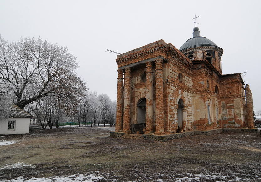 Церква Покрова Богородицi в Буртах